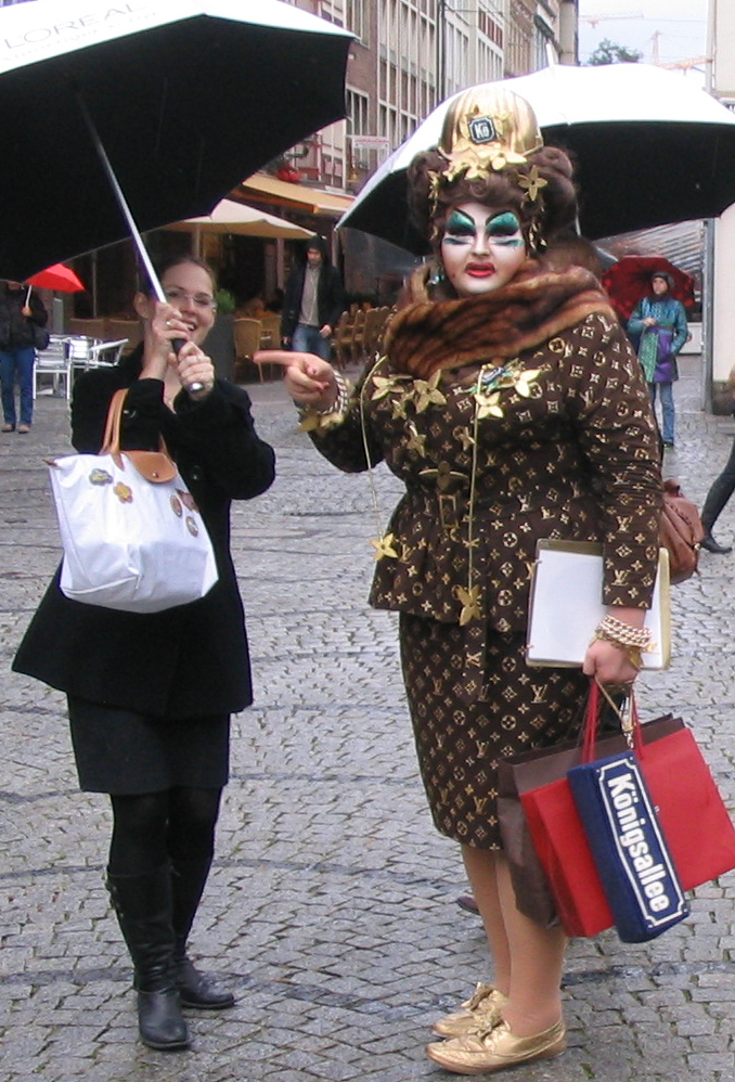 Freifrau von Kö auf dem Düsseldorfer Marktplatz, wohl zufällig während der Anwesenheit von Bundespräsident Christian Wulff im Rathaus. Außerdem wartende Mitarbeiter des Fernsehsenders Center TV.